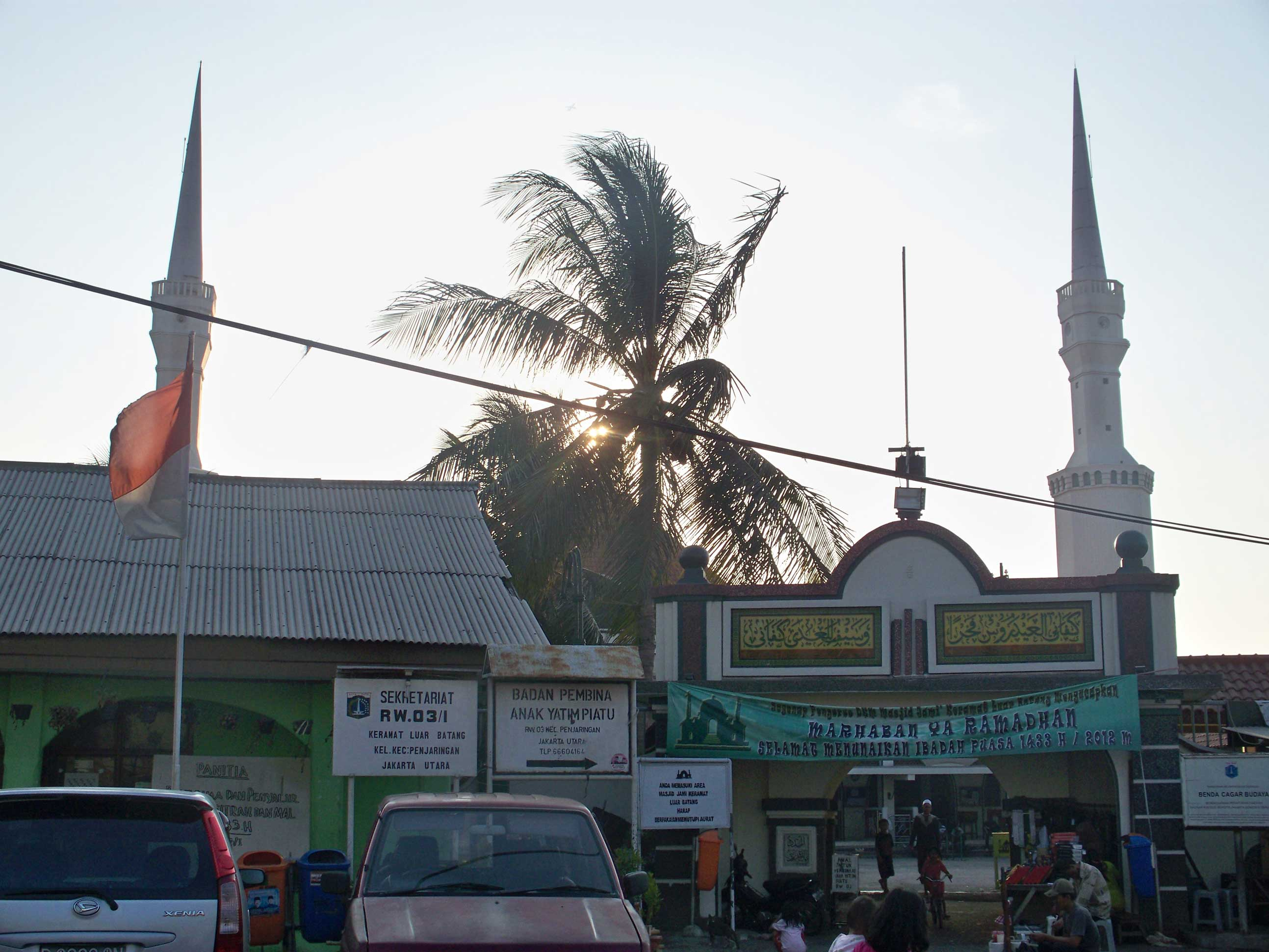 Masjid Luar Batang